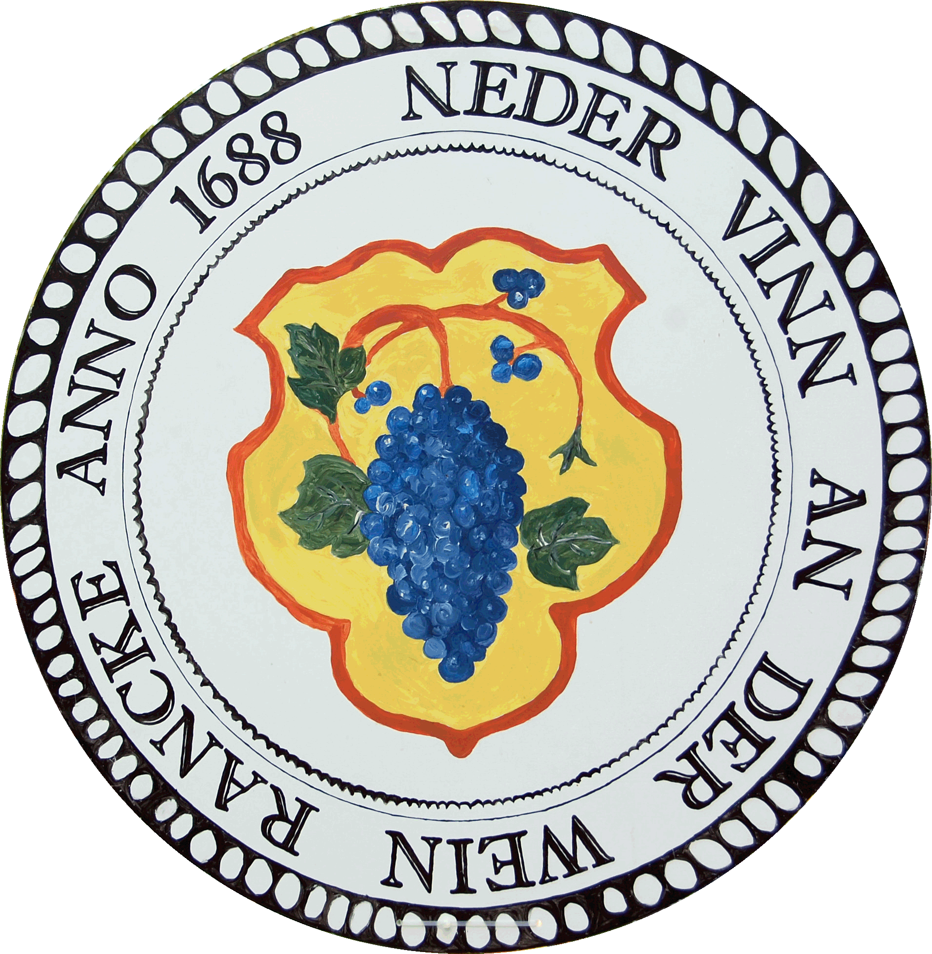 Wappen Niederfinow; gestaltet von Rudolf Schmidt (Journalist) nach Vorlagen aus dem 17. Jahrhundert